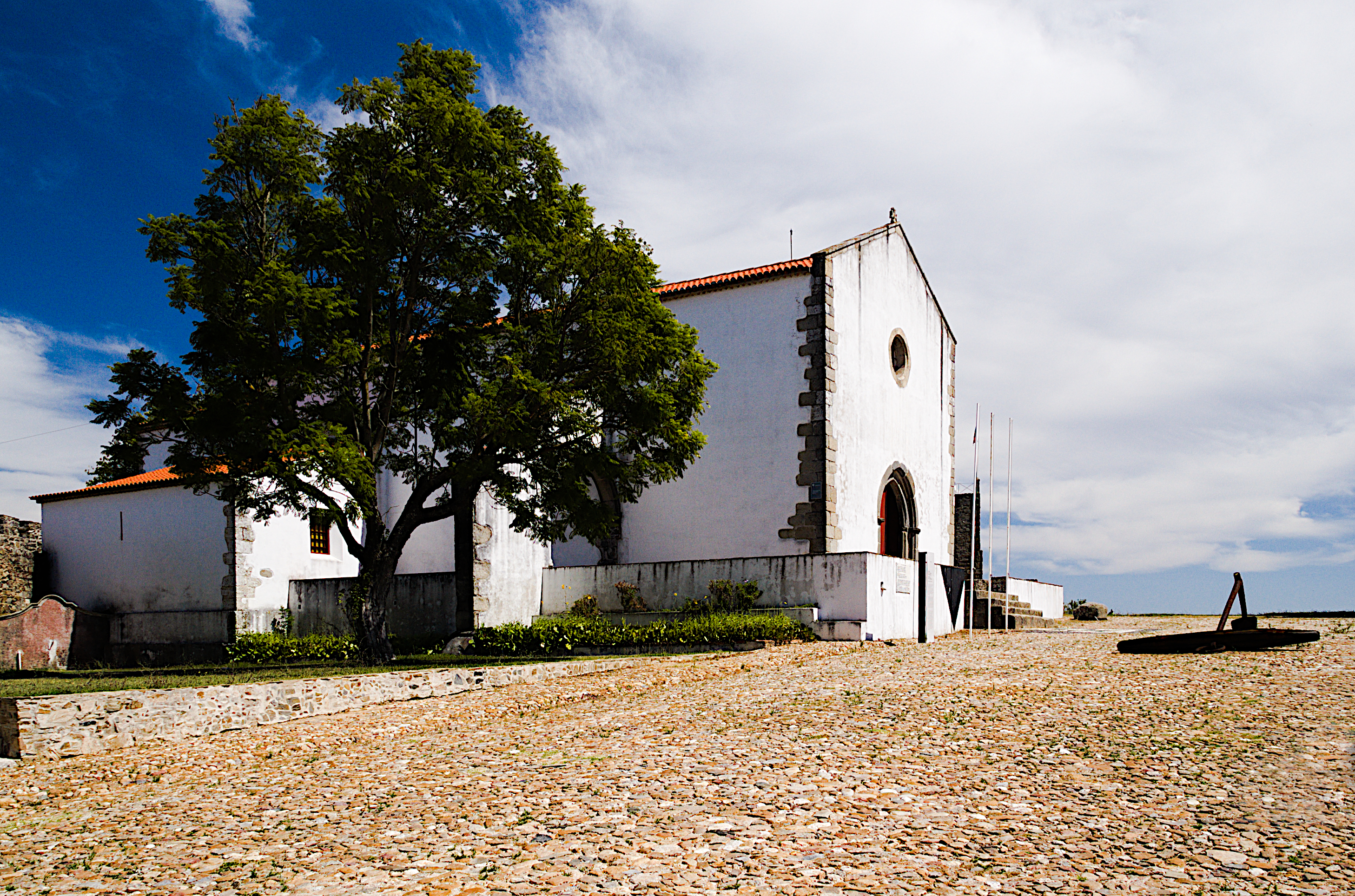 Lateral da Igreja de Santa Maria do Castelo de Abrantes